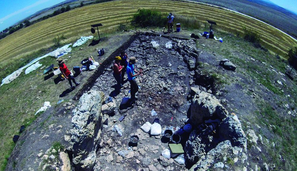 Foto de la excavación del dolmen El Pendón.